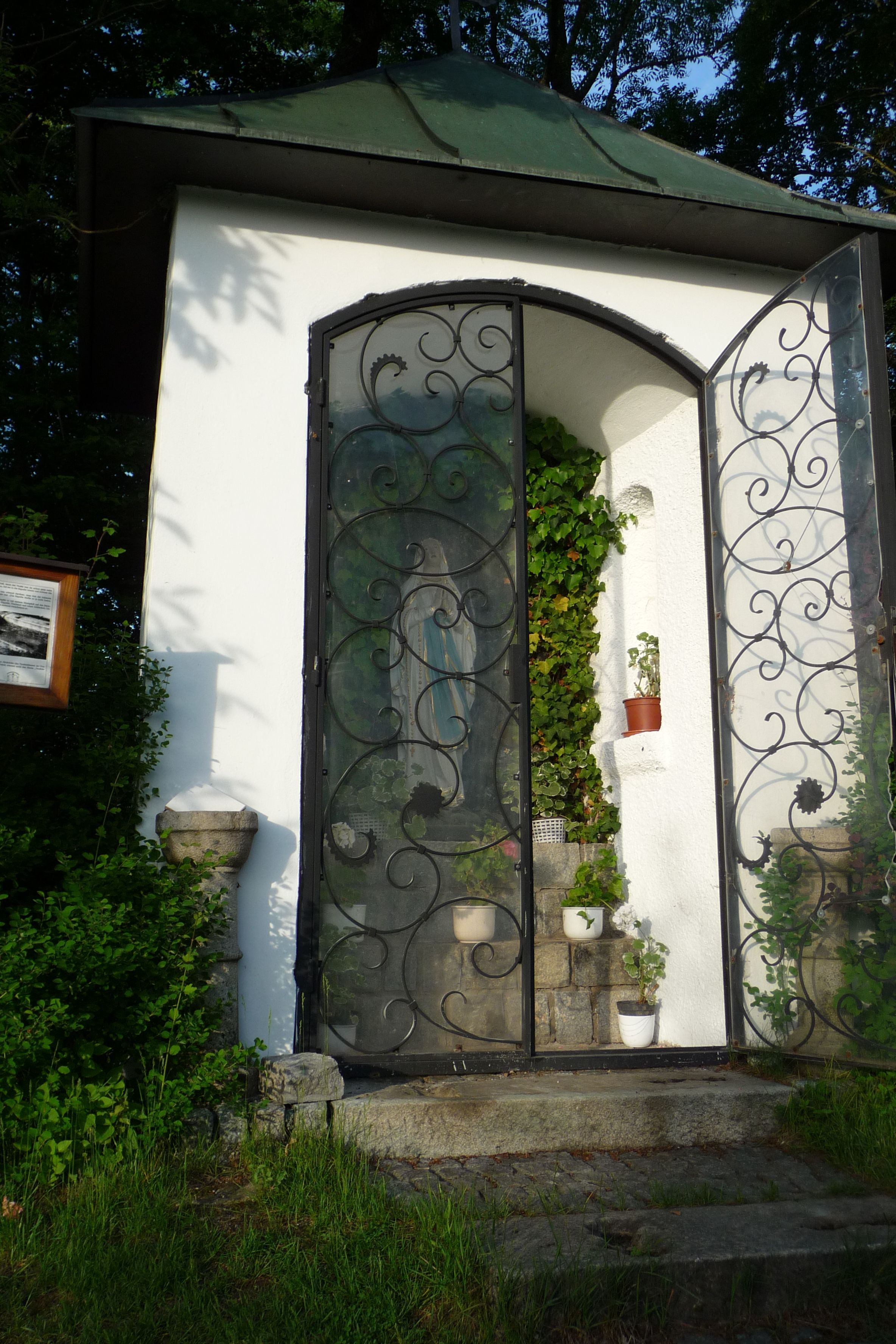 Teufeldkapelle am Maria Trost Berg